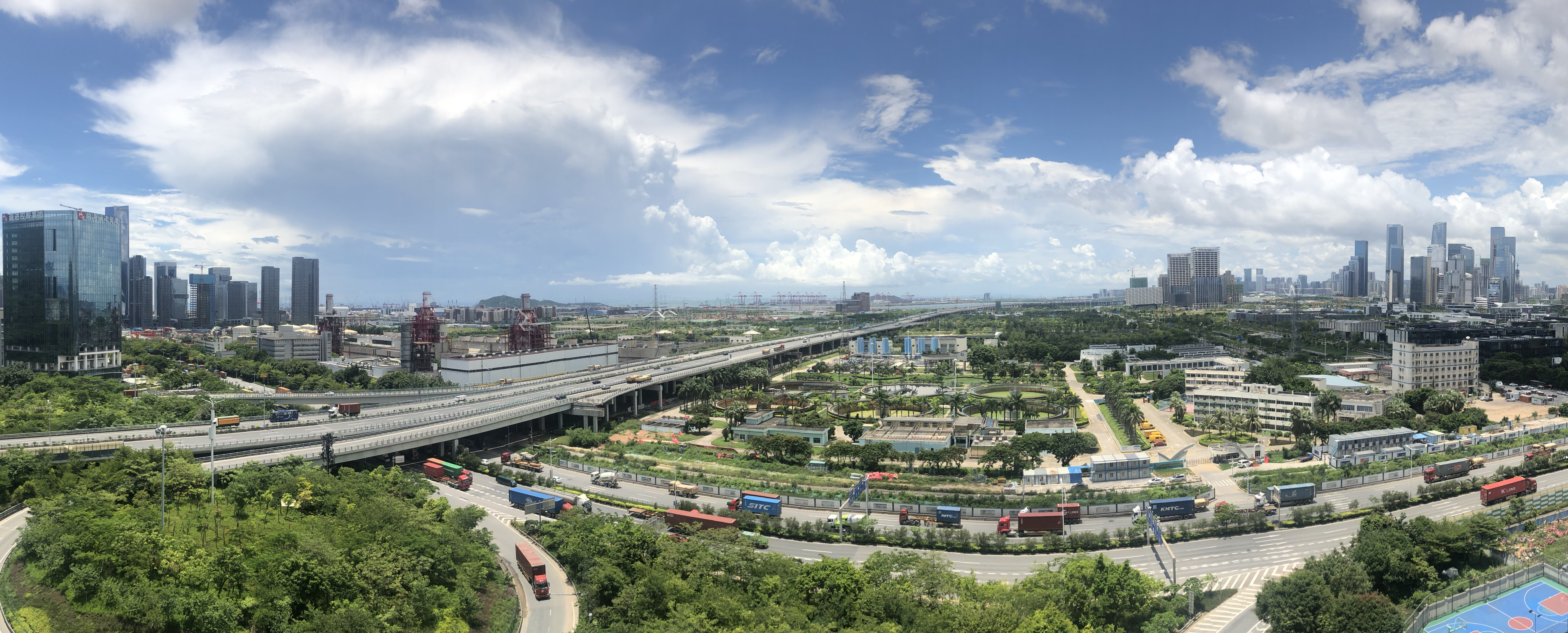 深圳前海自贸区大铲湾区域，图片左侧为前海湾保税港区，近景为南山区，右侧远景为深圳宝安区。近景横向道路为月亮湾大道，左侧纵向车道为广深沿江高速。